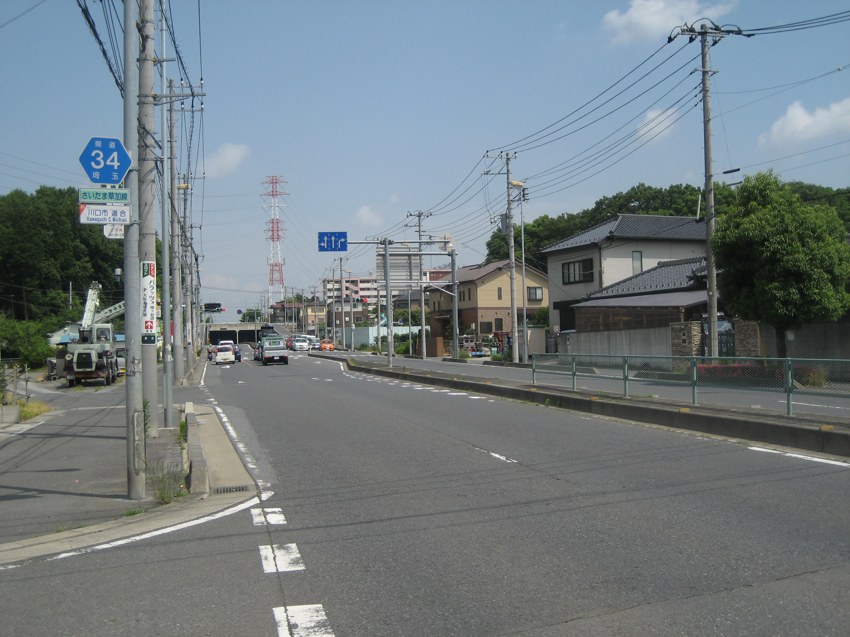 埼玉県道３４号線川口市道合付近